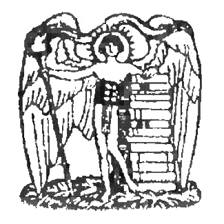 grafika z książki PL